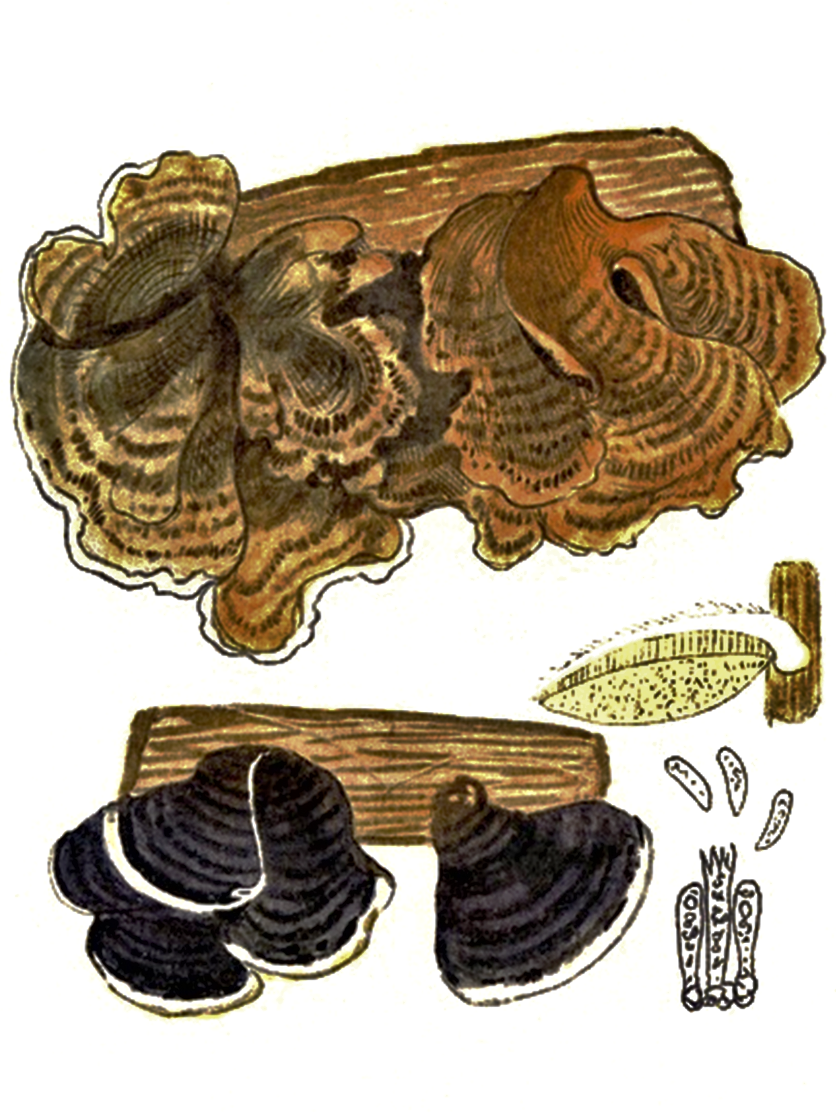 Bres.: Polystictus versicolor (L., 1753) Fr. (1851), heute: Trametes versicolor (L., 1753) Lloyd (1920)